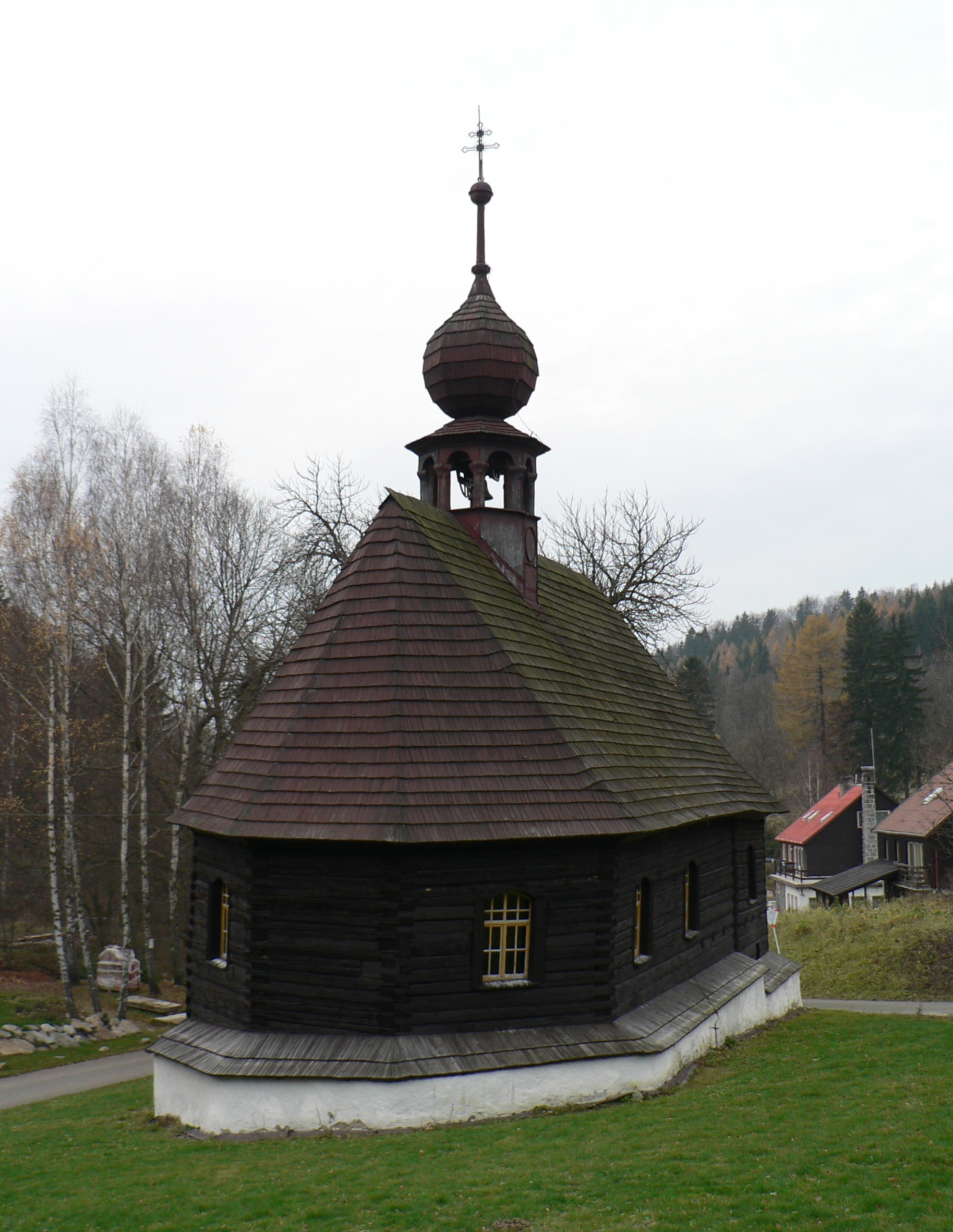 Kostelík svatého Jana Nepomuckého (Klepáčov)